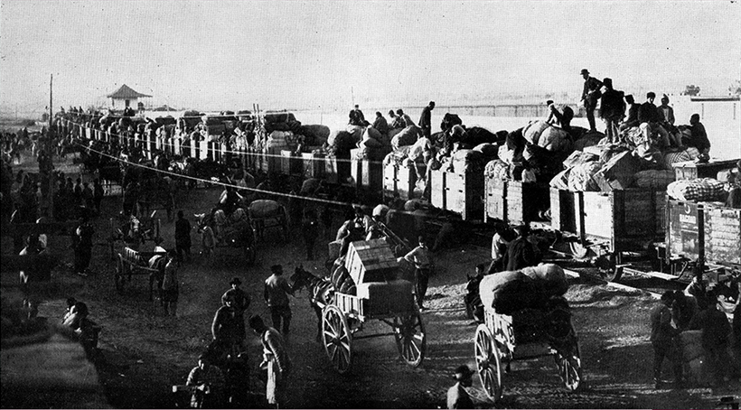 Tehcir edilen Adana Ermenileri Suriye'ye gitmek üzere trene binerken